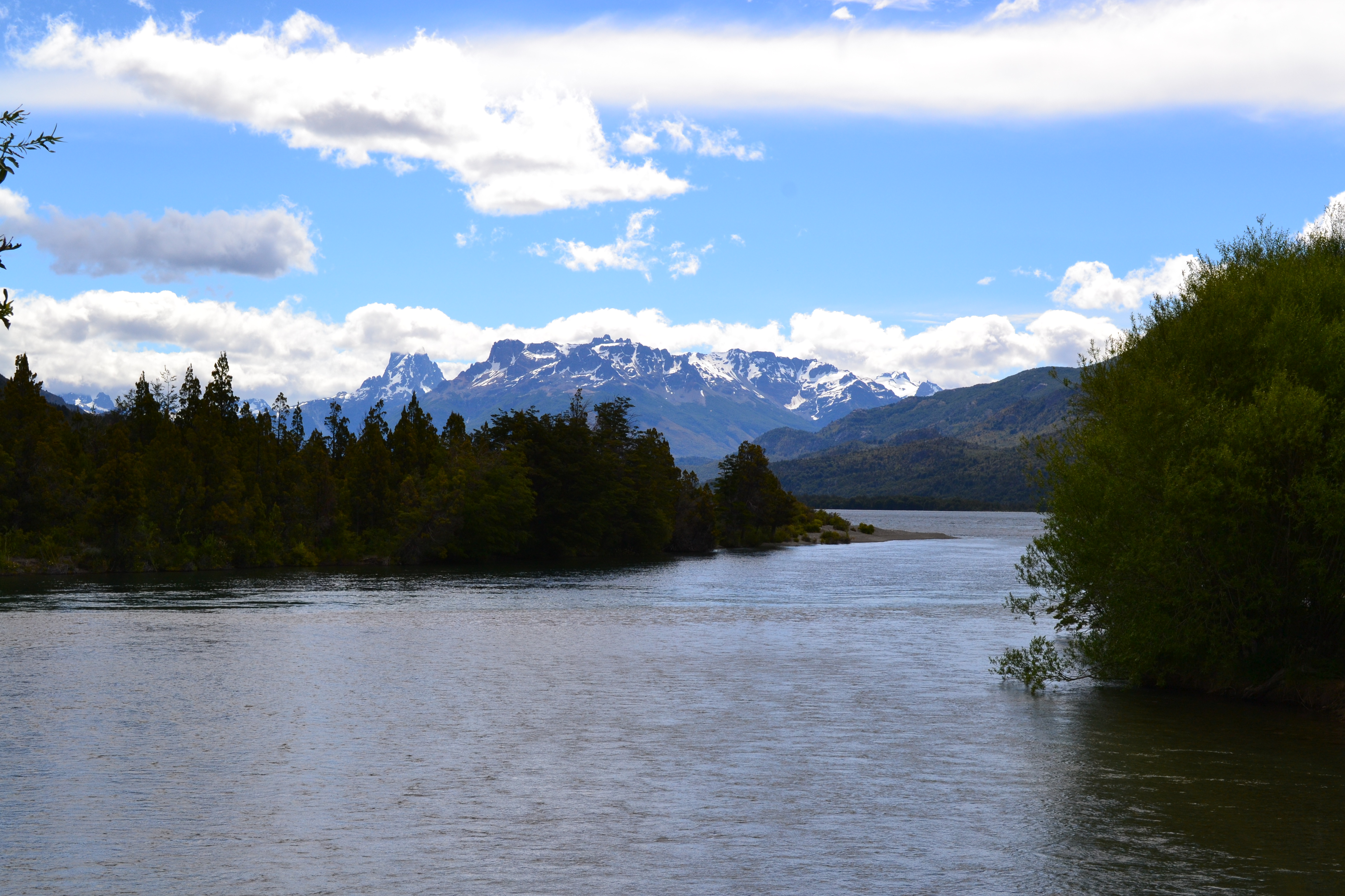 Lake Cholila